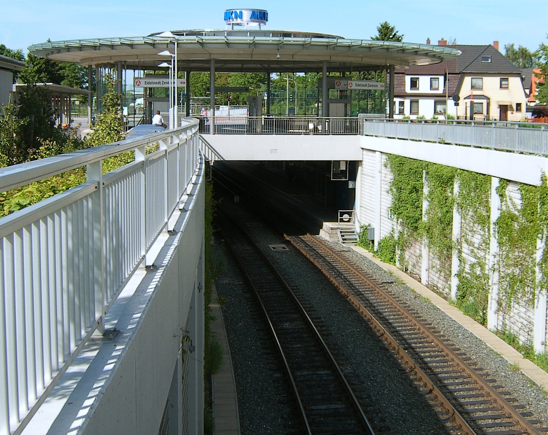 Bildbeschreibung: Hamburg, Eidelstedt, AKN-Haltepunkt Eidelstedt-Zentrum Fotograf: selbst Datum: 9.6.2006